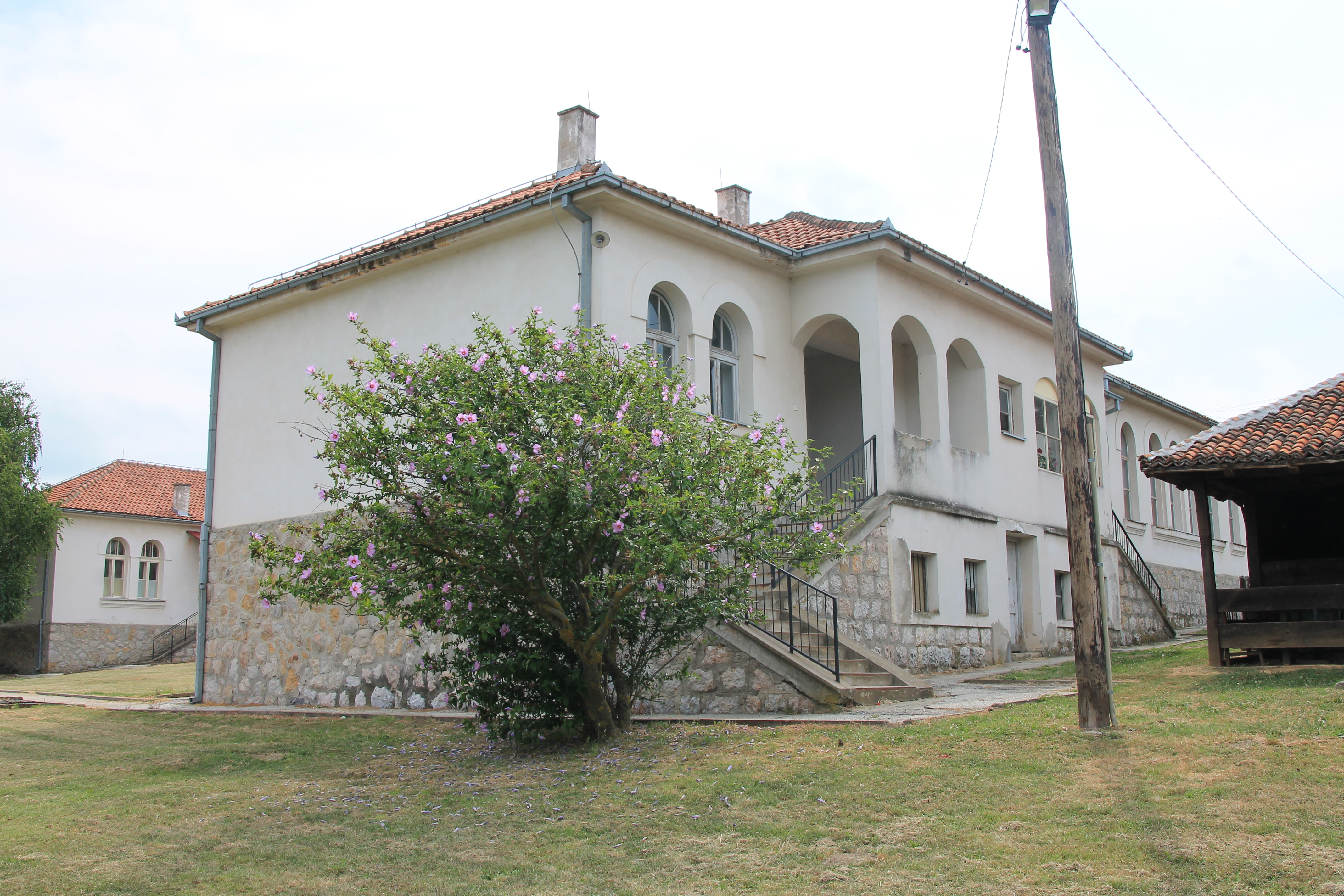 OŠ „Prota Stevan Popović“ Čumić